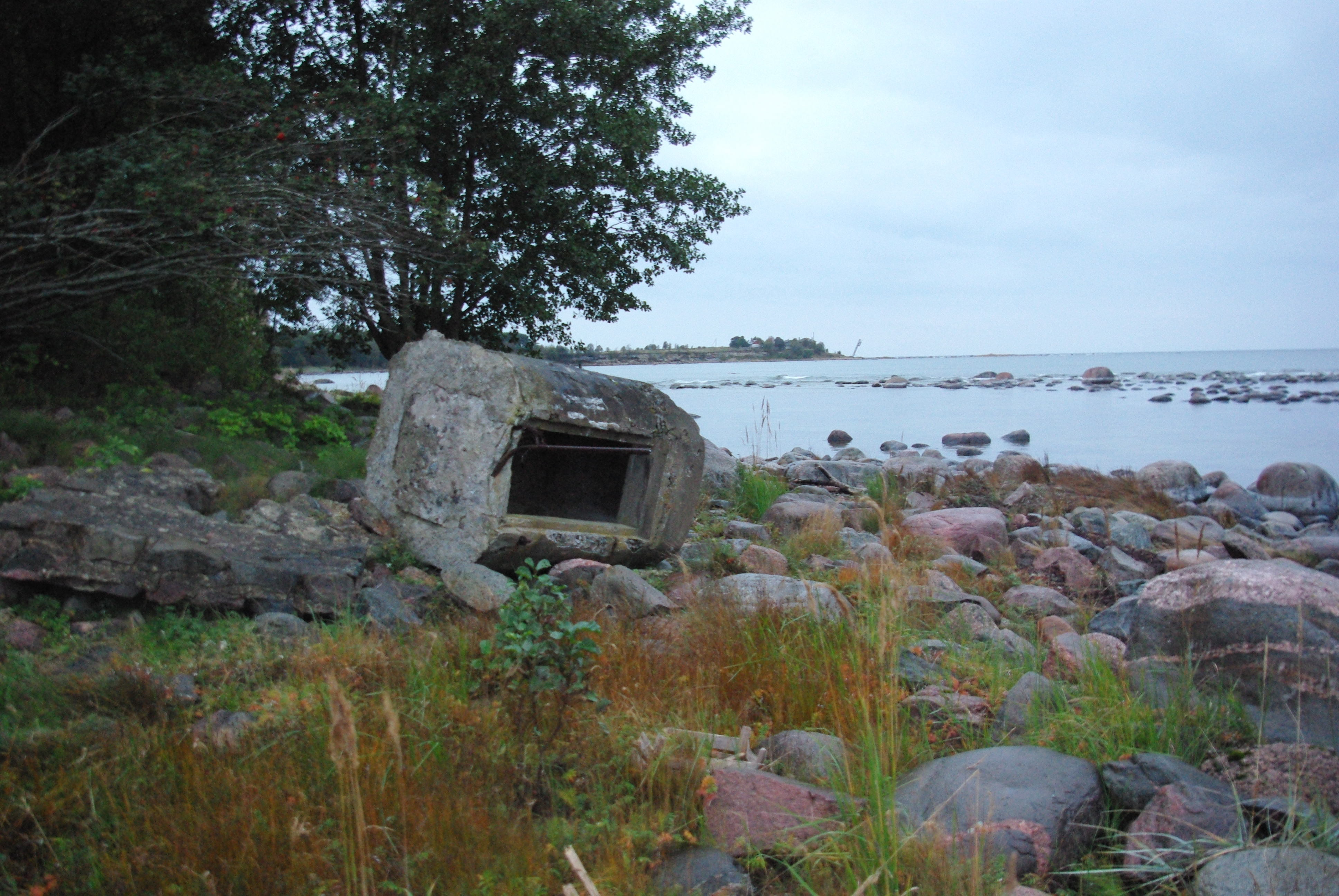 Peeter Suure merekindluse rannakaitsepatarei nr. 3 helgiheitja varjendi vare ja positsioon, 1916. a.